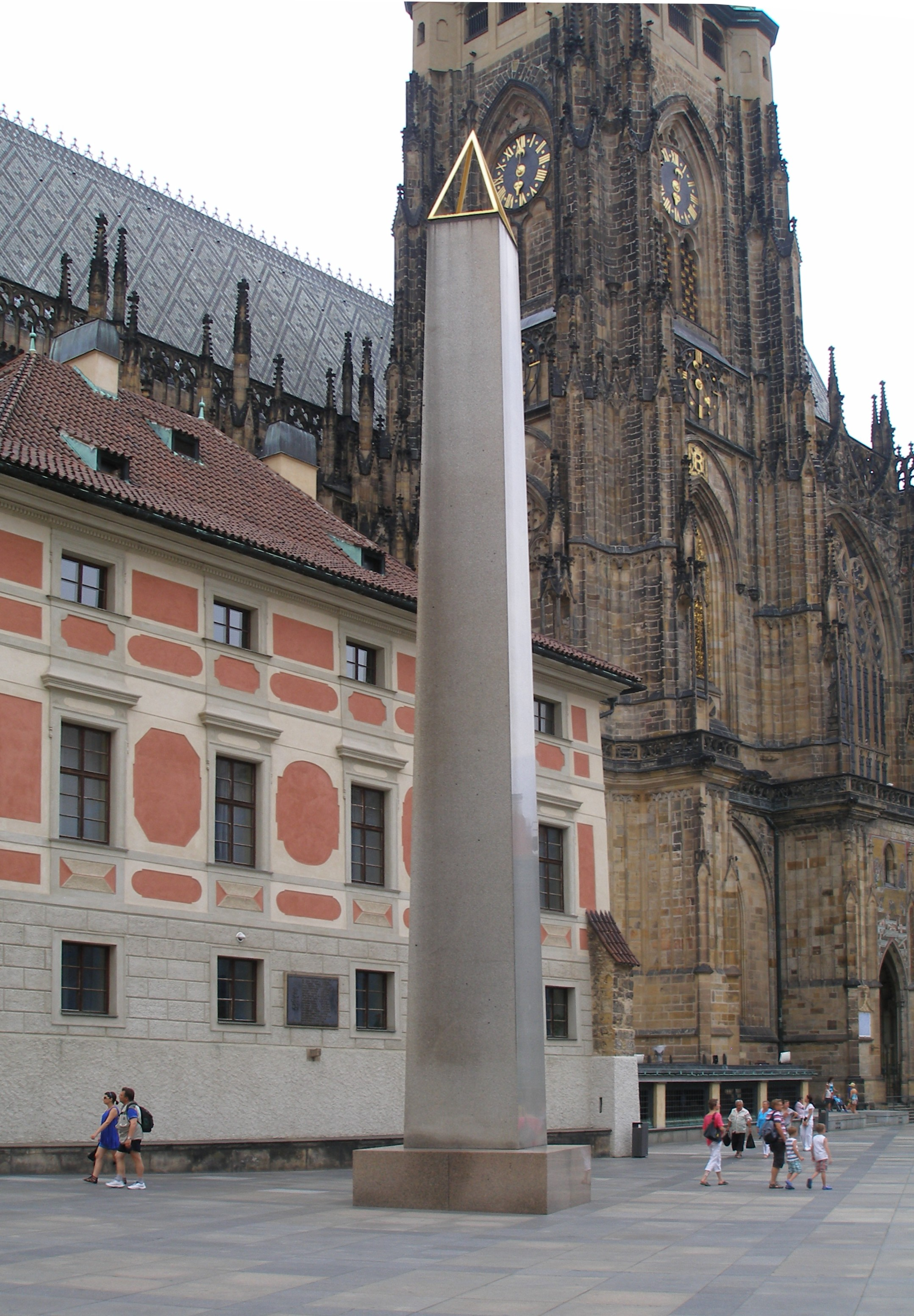 Obelisk na třetím nádvoří Pražského hradu.